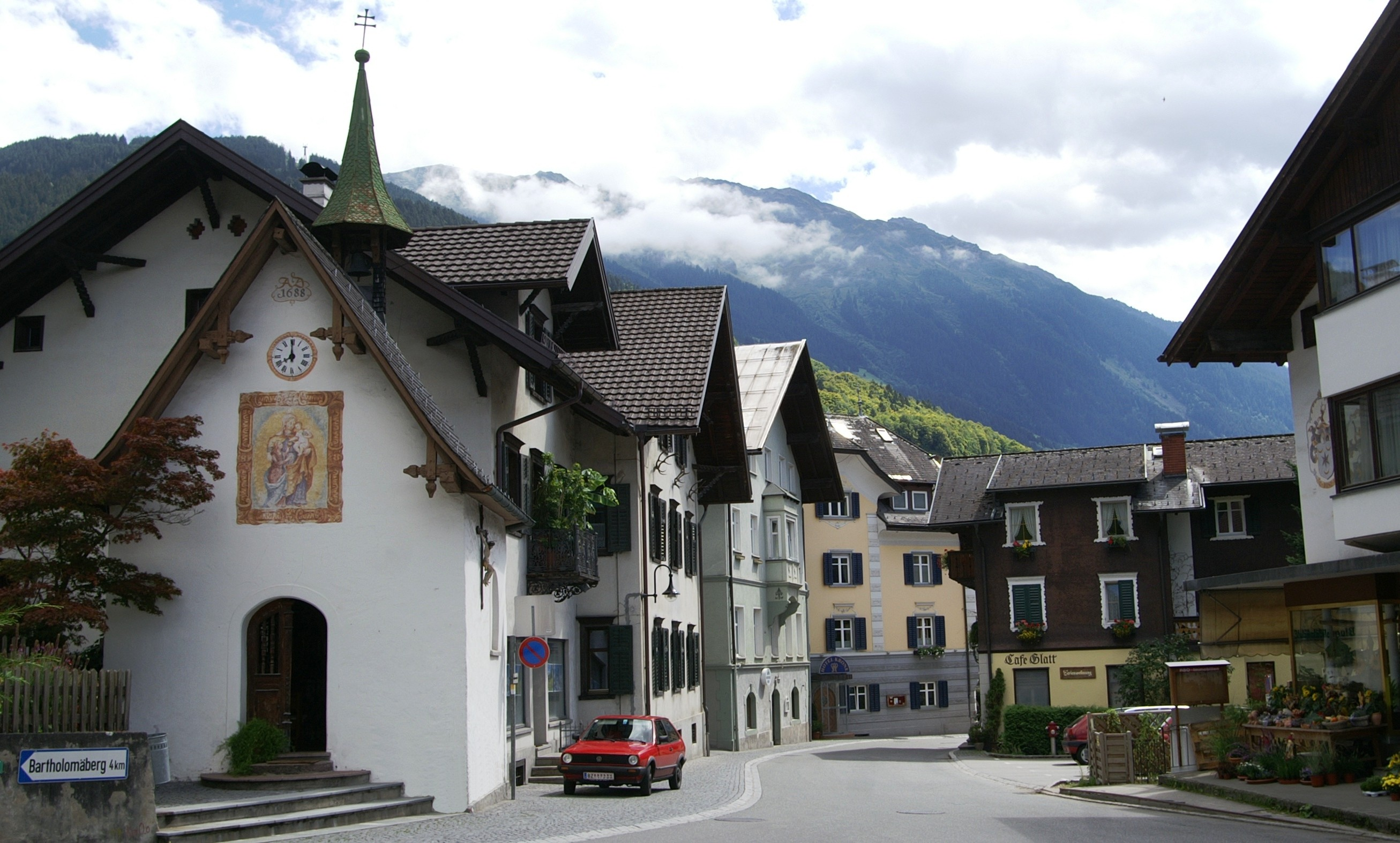 Litzkapelle im Dorfkern in Schruns, im Montafon